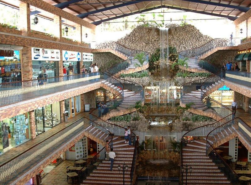 CC La Cascada